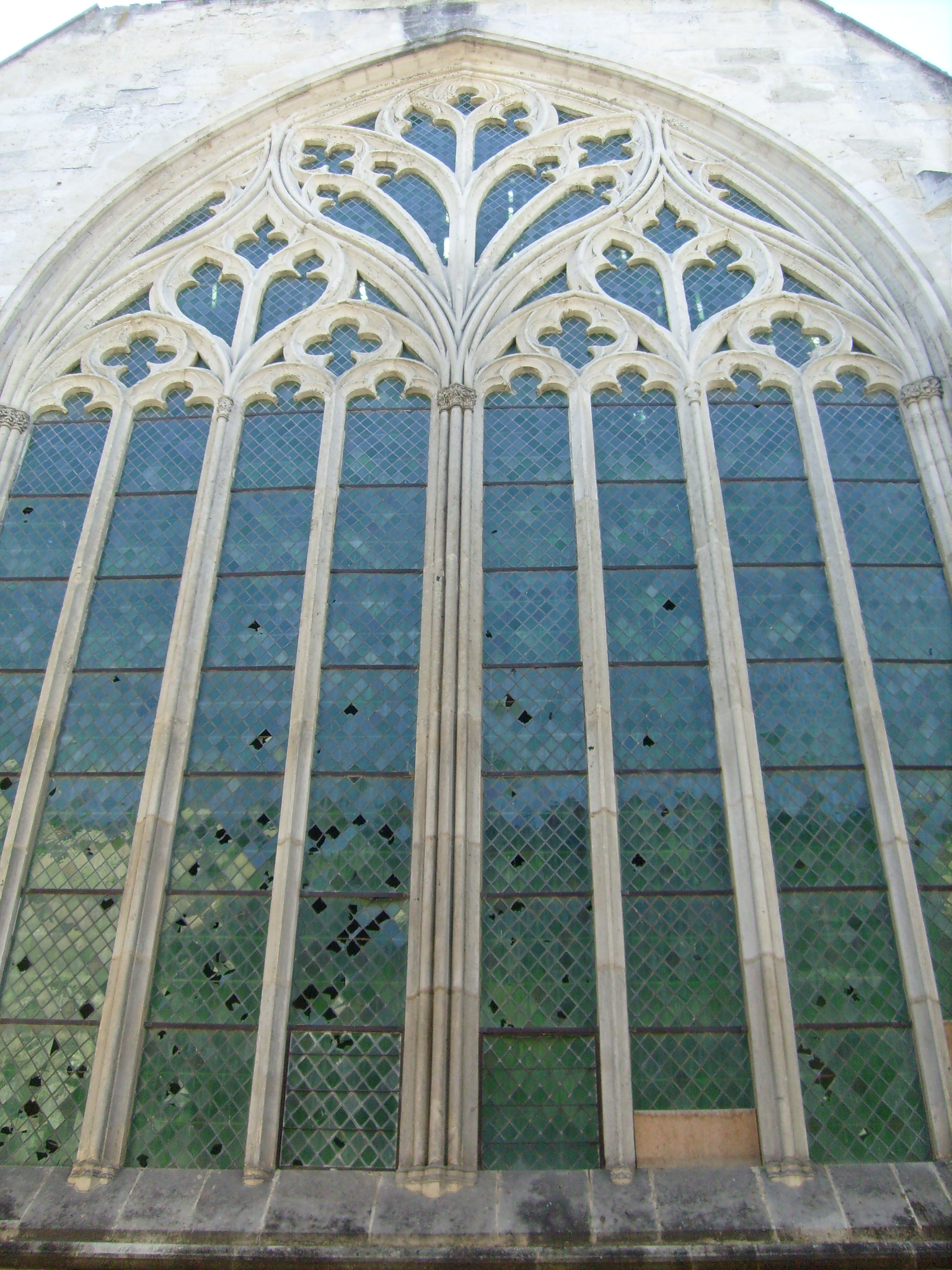 L'ancienne église des Jacobins de Saintes